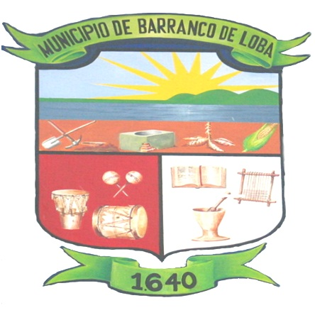 Escudo Barranco De Loba